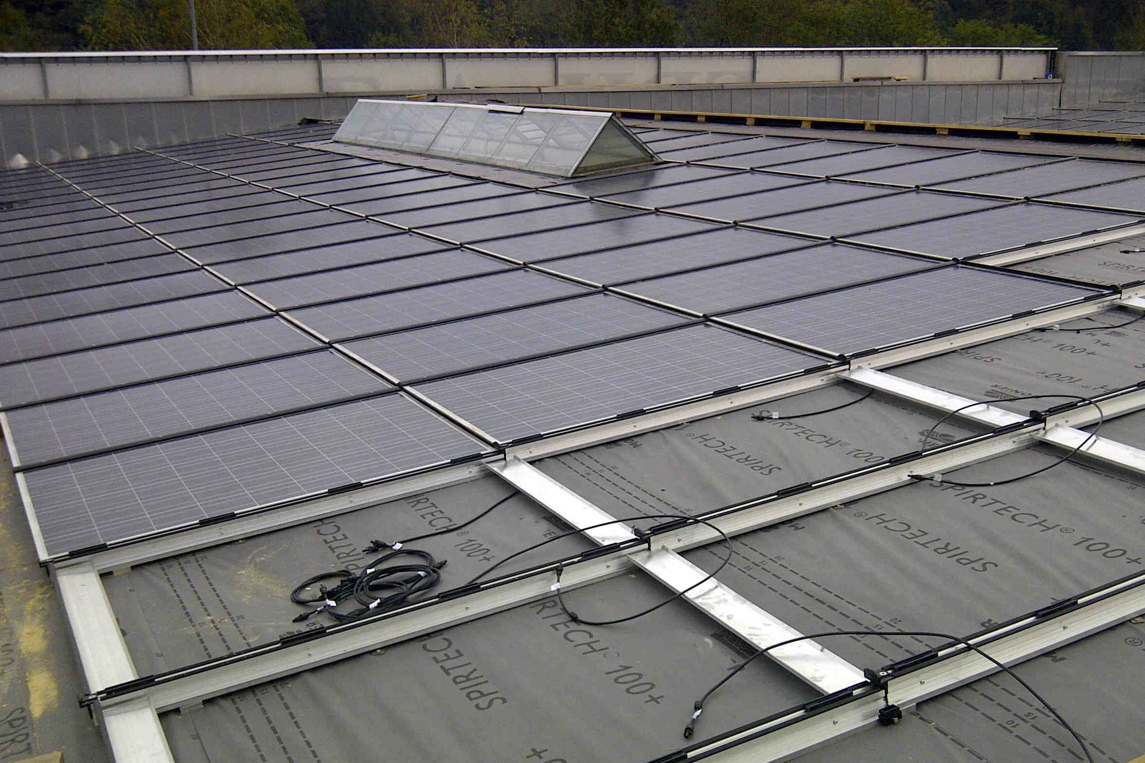 Particolare di montaggio di moduli laminati architettonicamente integrati con presenza di barriera al vapore.